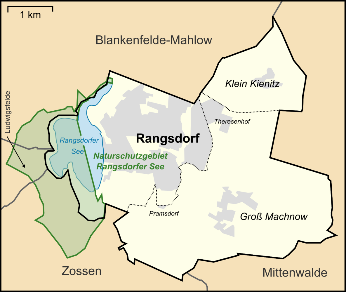 Karte des Naturschutzgebietes Rangsdorfer See